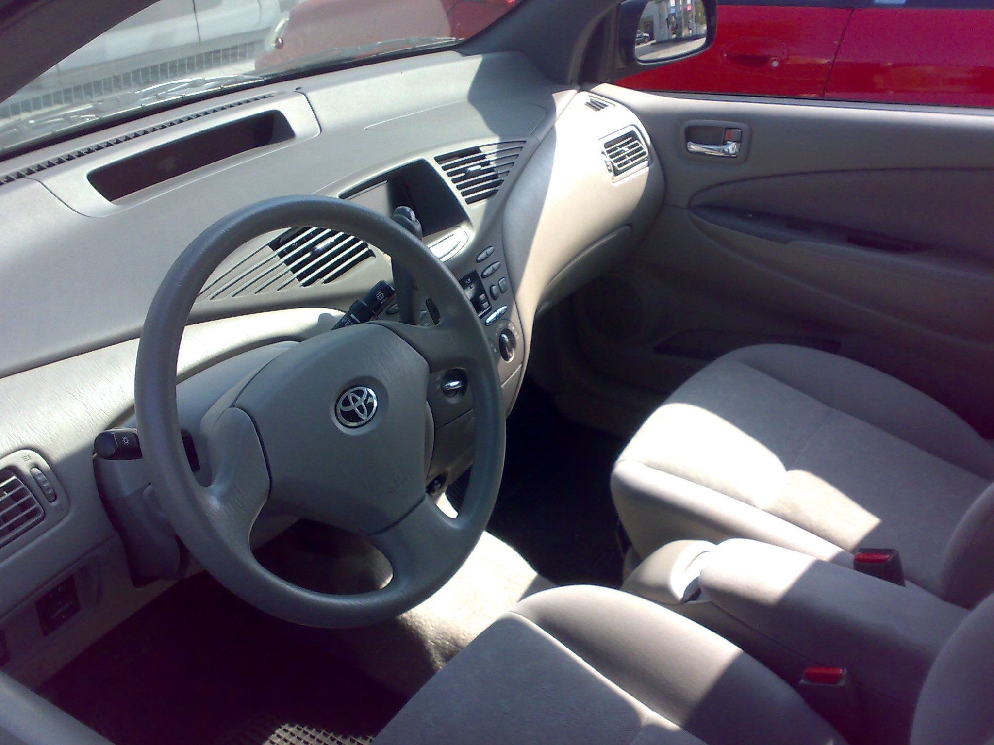 Toyota Prius de primeira geração.